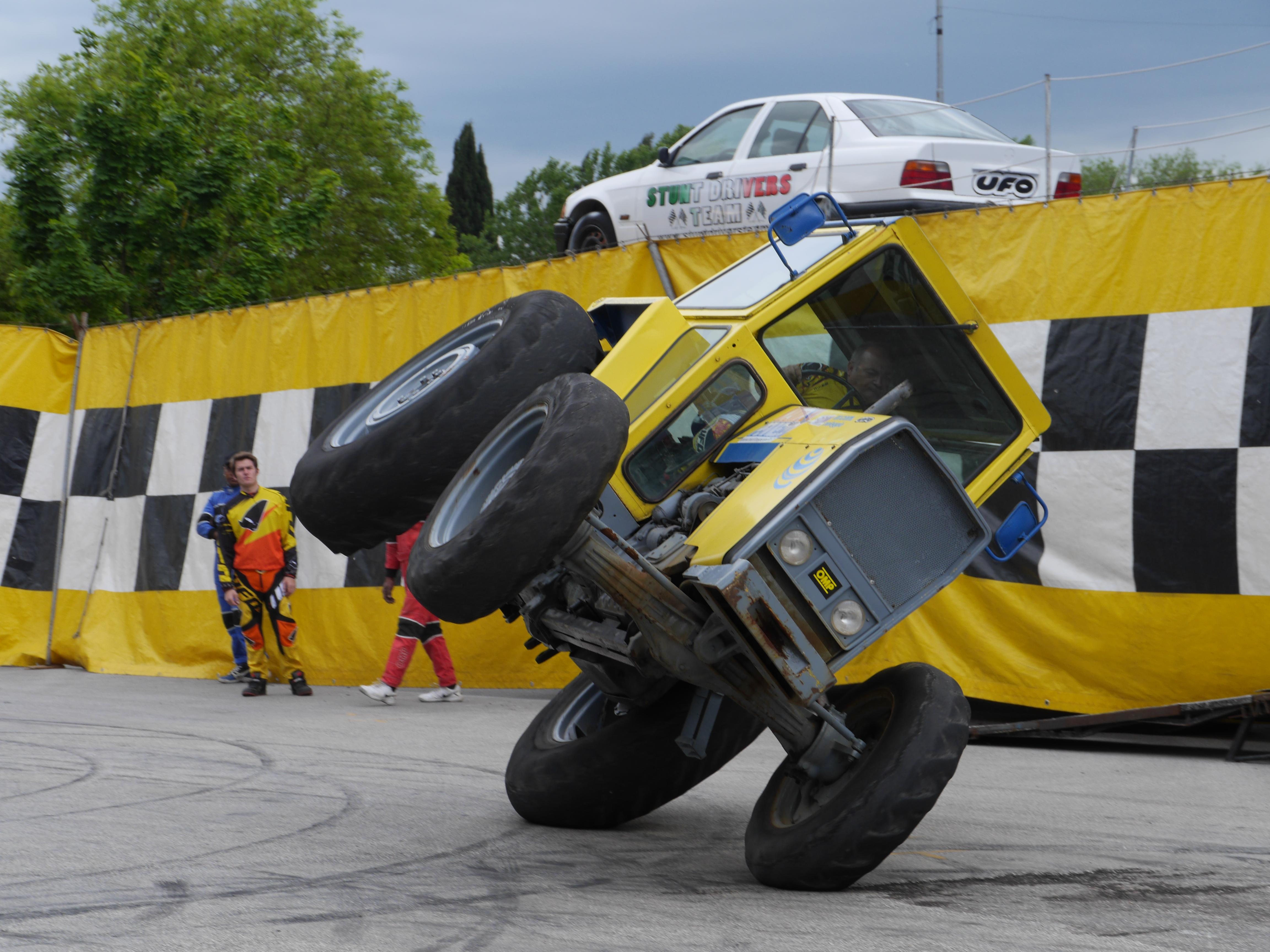 This photo was taken with Panasonic Lumix DMC-GH3 camera, thanks to Panasonic. You can see all photographs in category: Taken with Panasonic Lumix DMC-GH3.